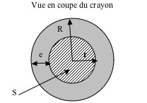 Schéma en coupe du Ludion.